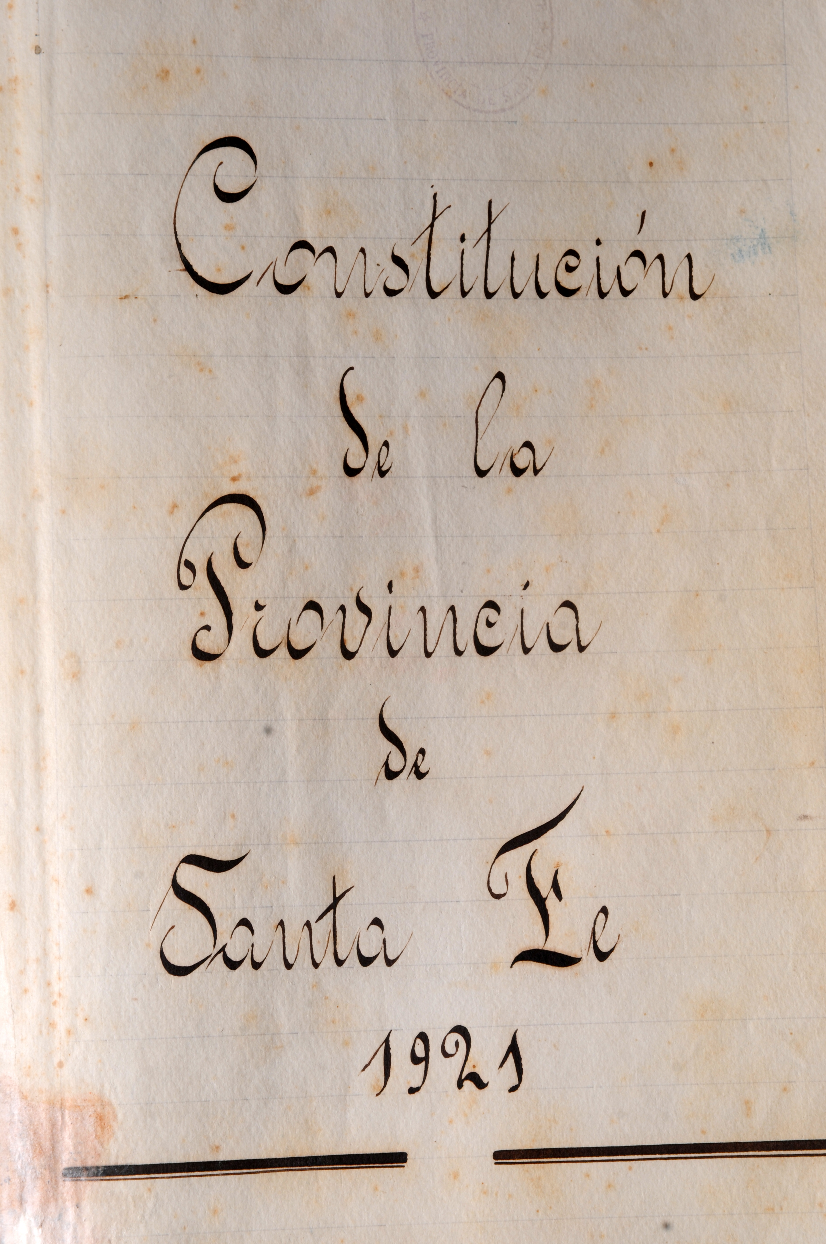 Tapa de la Constitución de 1921 de la provincia de Santa Fe